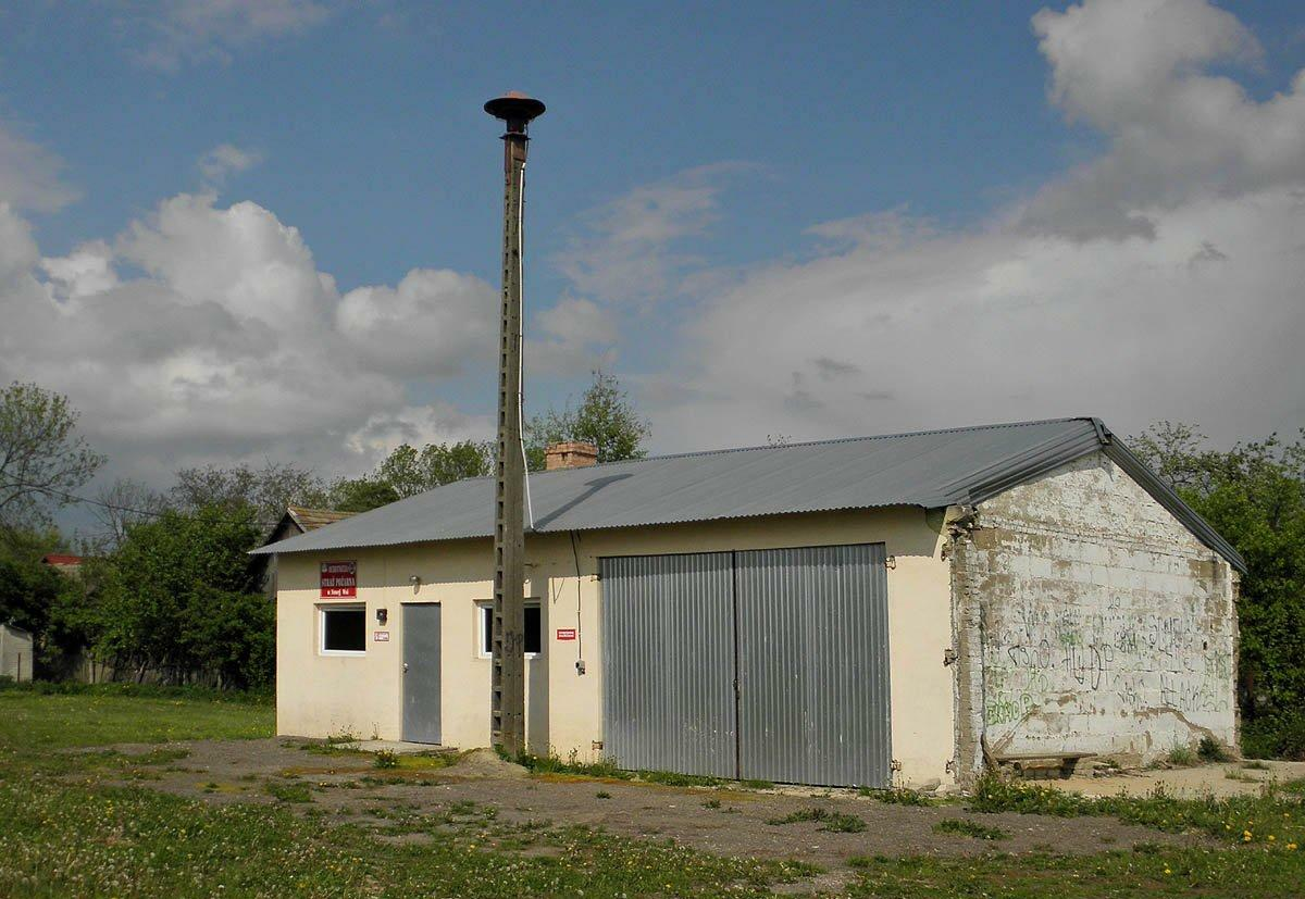 Remiza OSP w Nowej Wsi.